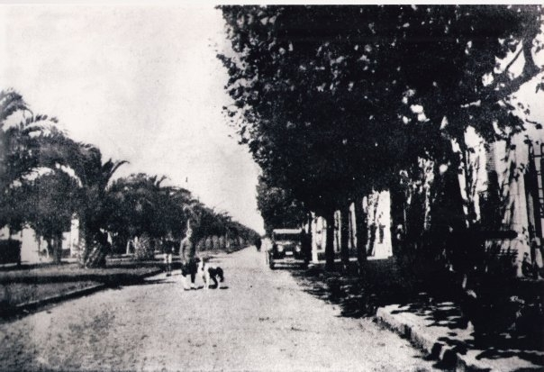 Avenida Ituzaingó-del Libertador, 1919, Merlo, provincia de Buenos Aire.